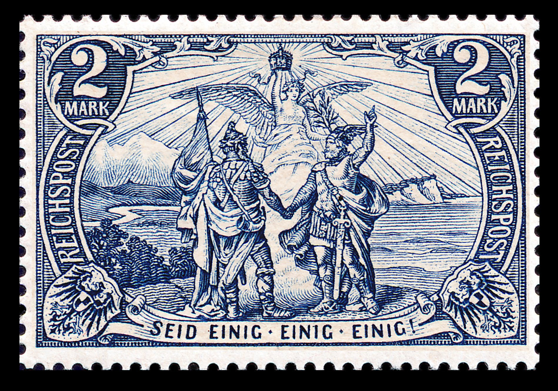 Germania 64 Type I geprüft Jaeschke Lantelme